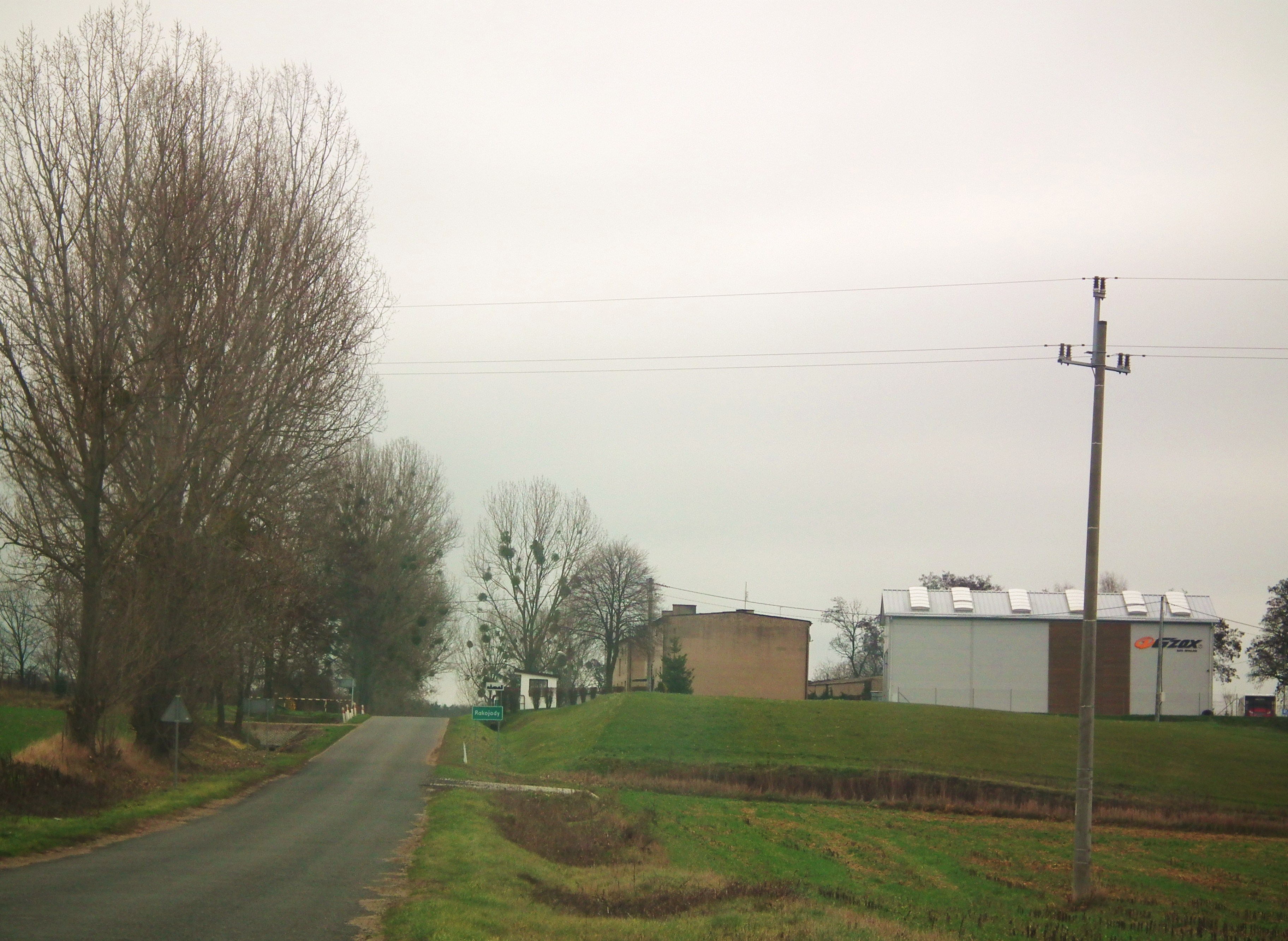 Rakojady koło Skoków.